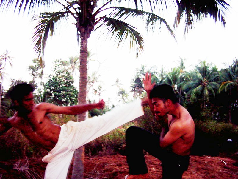 അടി തട